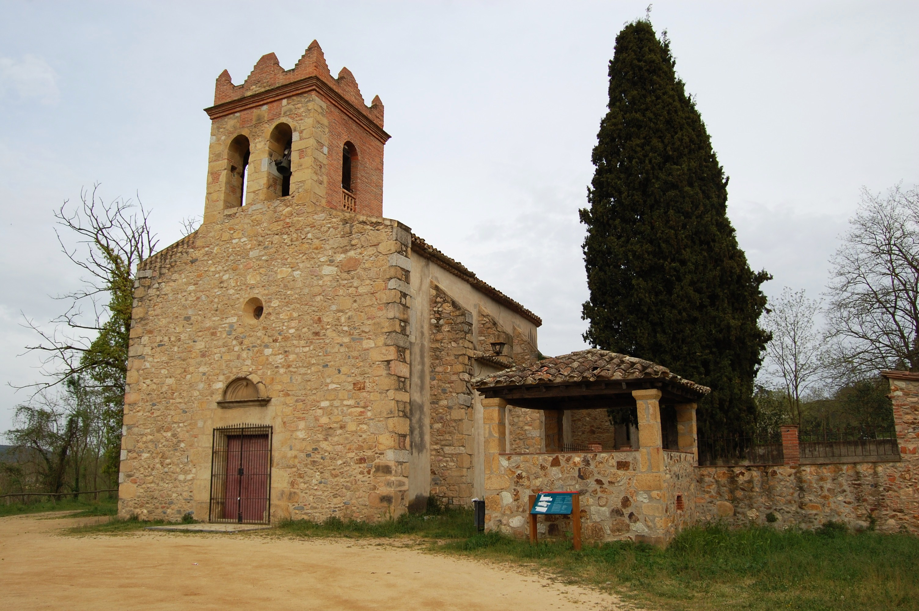 Església de Sant Cebrià de Fogars de la Selva amb comunidor i cementiri.